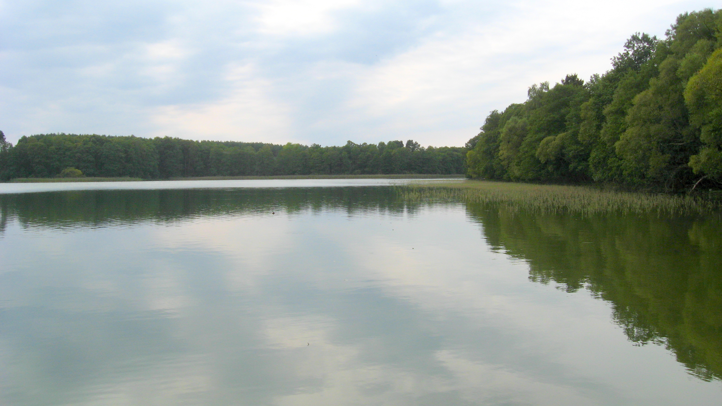 Jezioro Bielsko - widok z Trzmielewa w woj. pomorskim